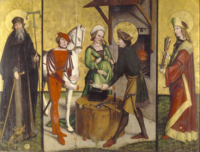 Tafelgemälde, vertikal durch schwarze Linien dreigeteilt: links: Hl. Antonius Eremita Mitte: Wunder des hl. Eligius rechts: Hl. Sebastian Öltempera auf Holz; 104 cm x 136.7 cm. Aus der Augustinerkirche in Zürich. Schweizerisches Nationalmuseum, Zürich